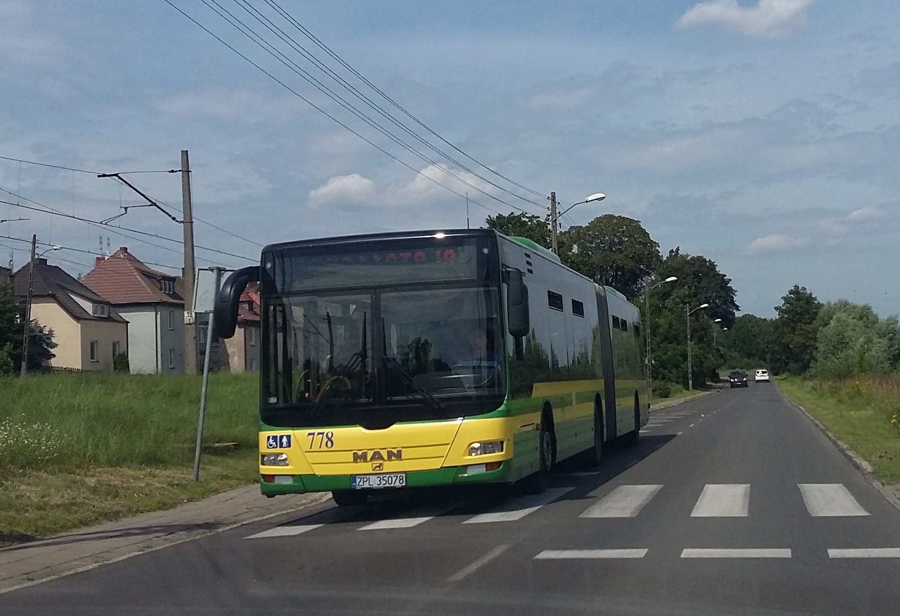 MAN NG 323 Lion's City w Policach, 2016 r.